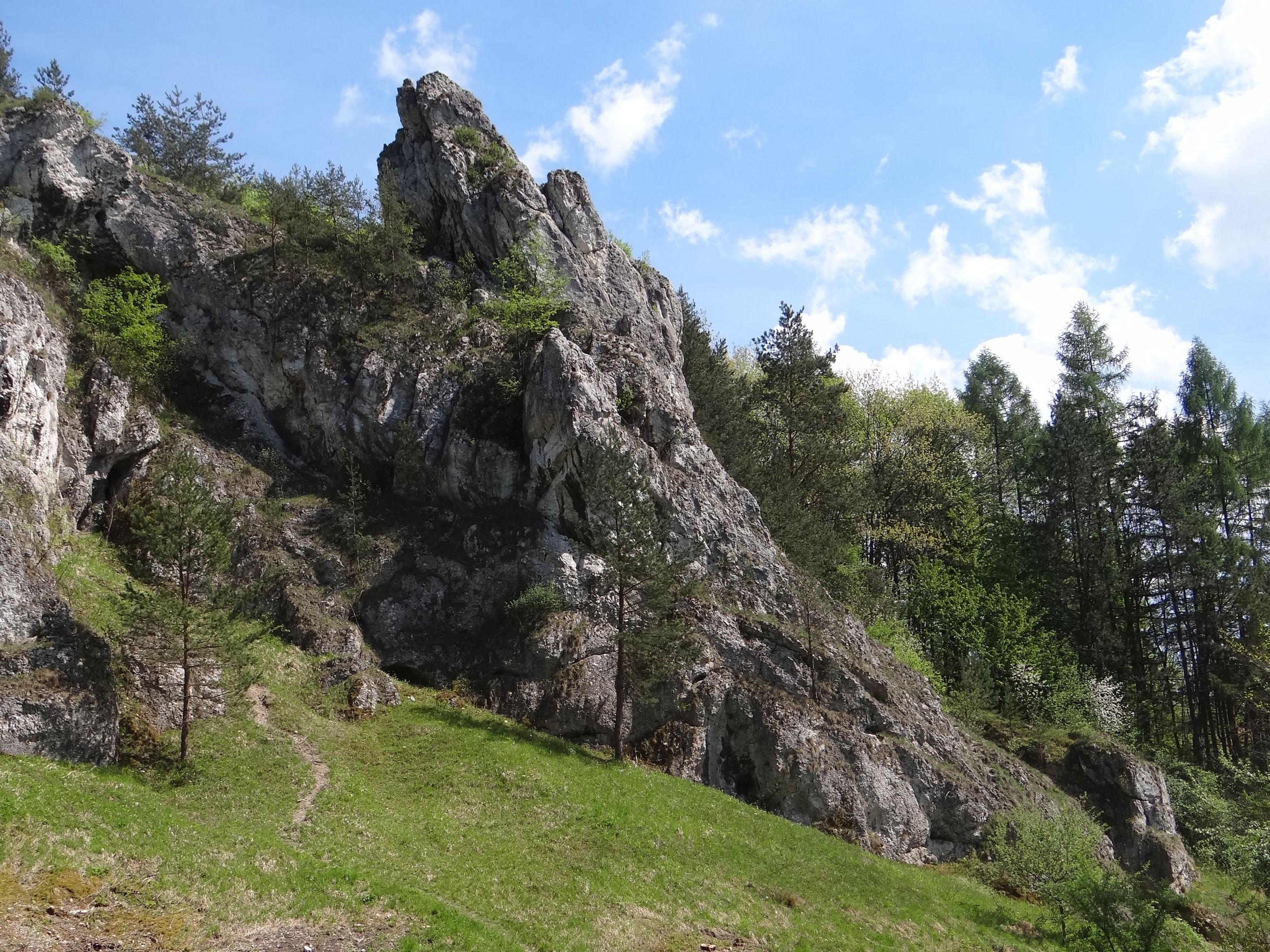 Turnie Mnich i Dziób Kobylański w Dolinie Kobylańskiej